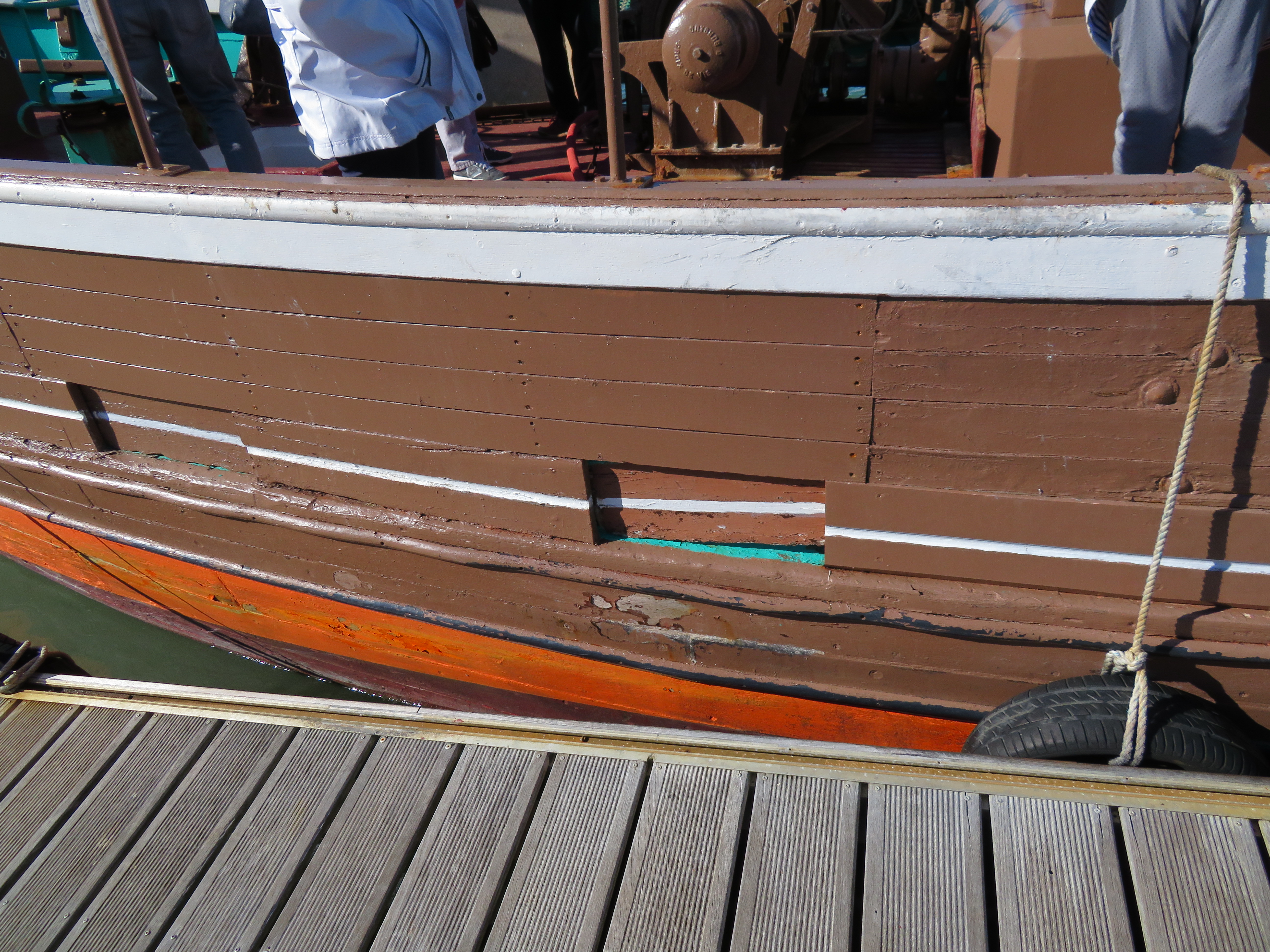 Détail de la coque. Photo du Kifanlo prise lors des journées européennes du patrimoine 2017 aux Sables d’Olonne.